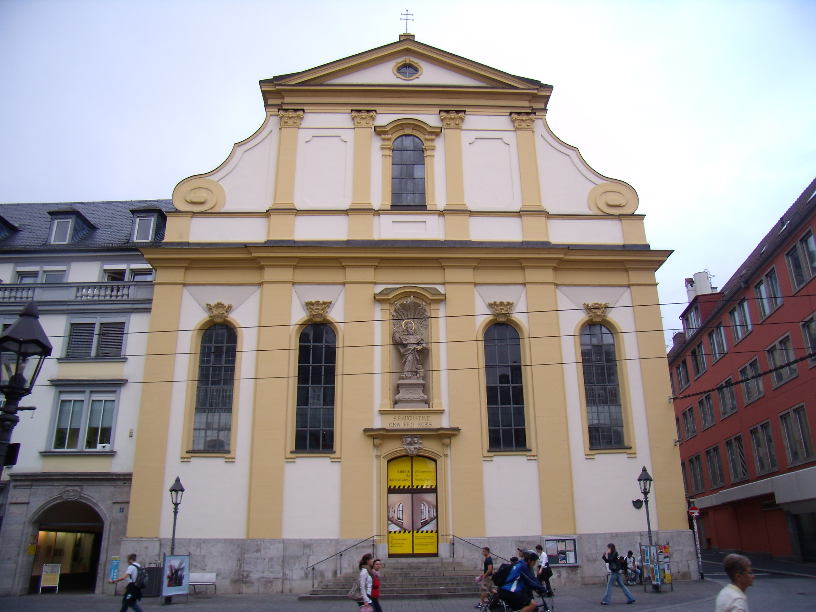 Würzburg - Dominikanerplatz St. Augustus